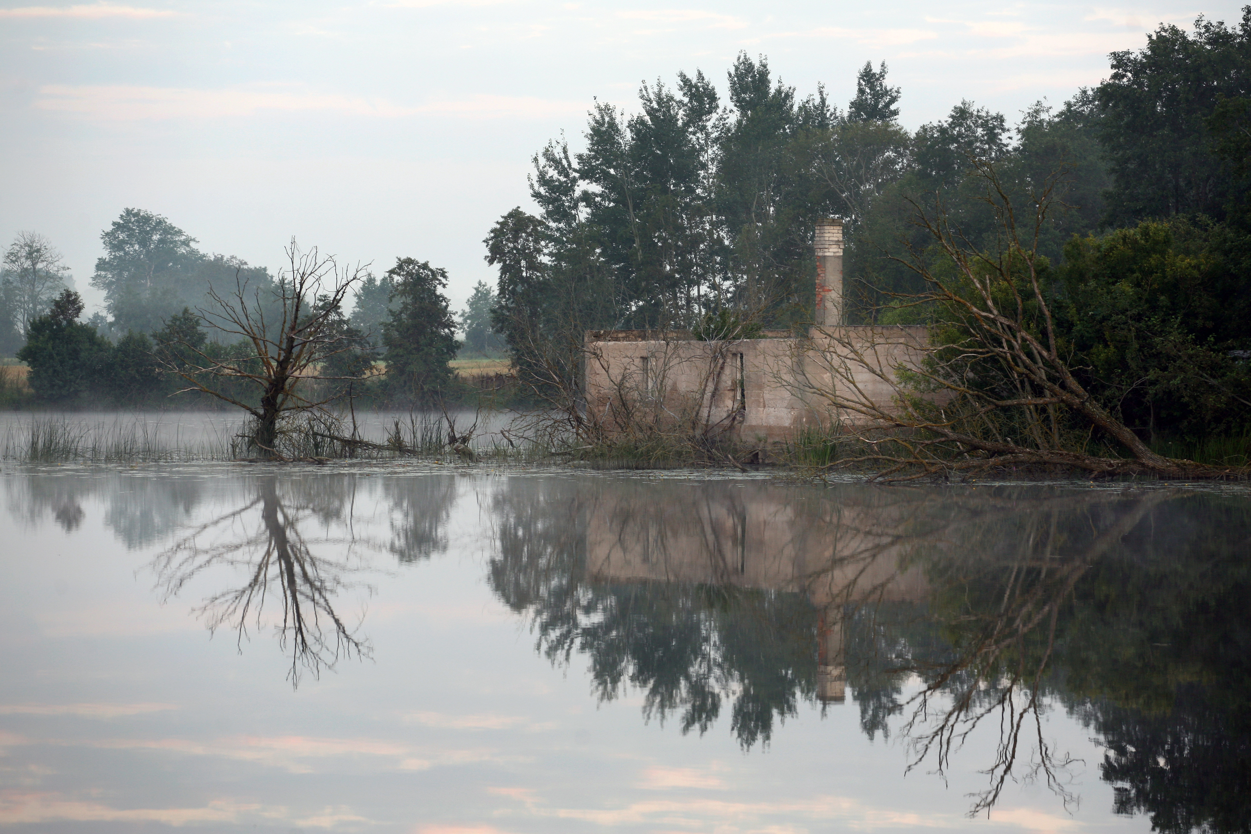 Māju drupas pie Annenieku dīķa